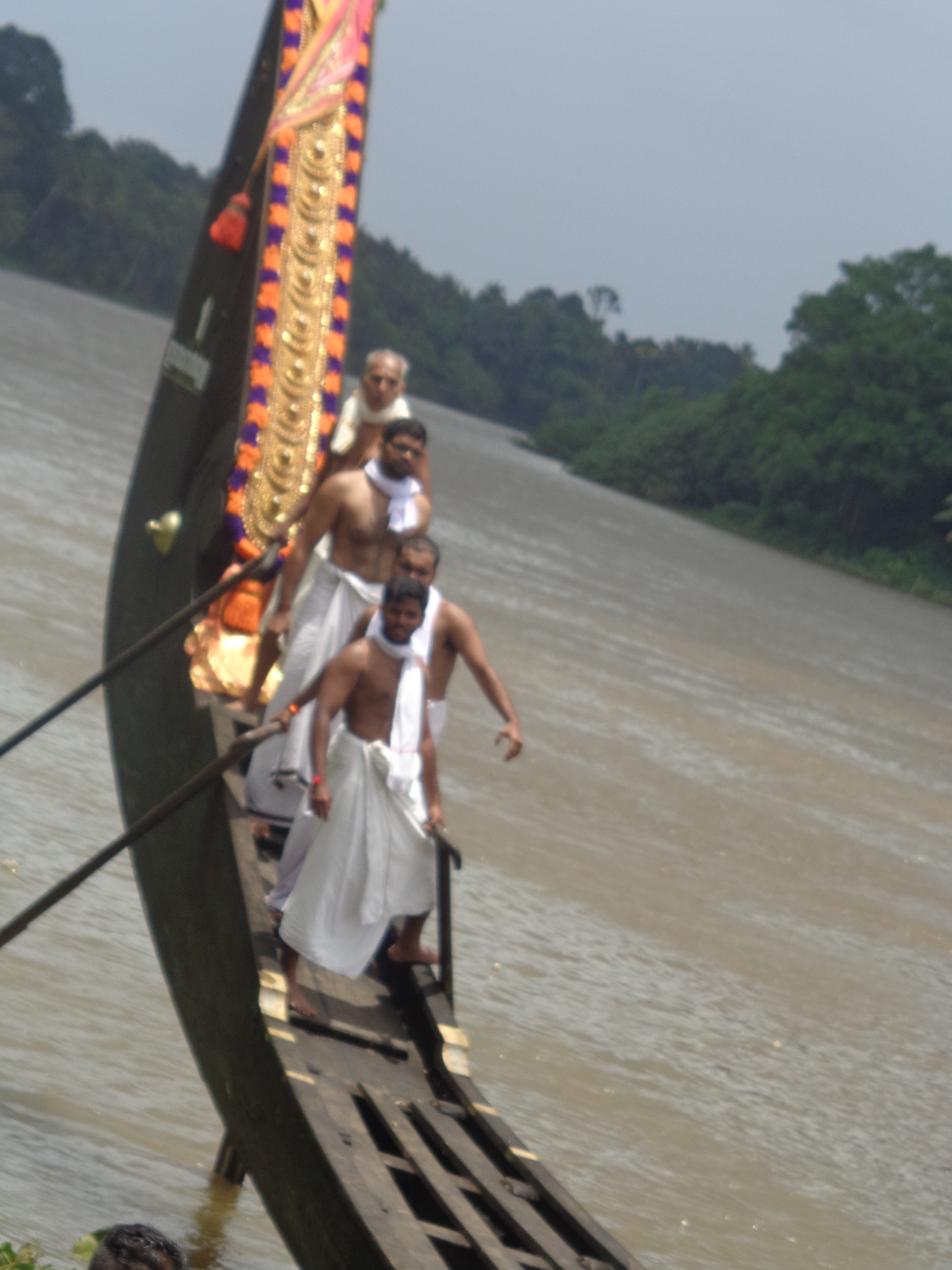 decorated boat top